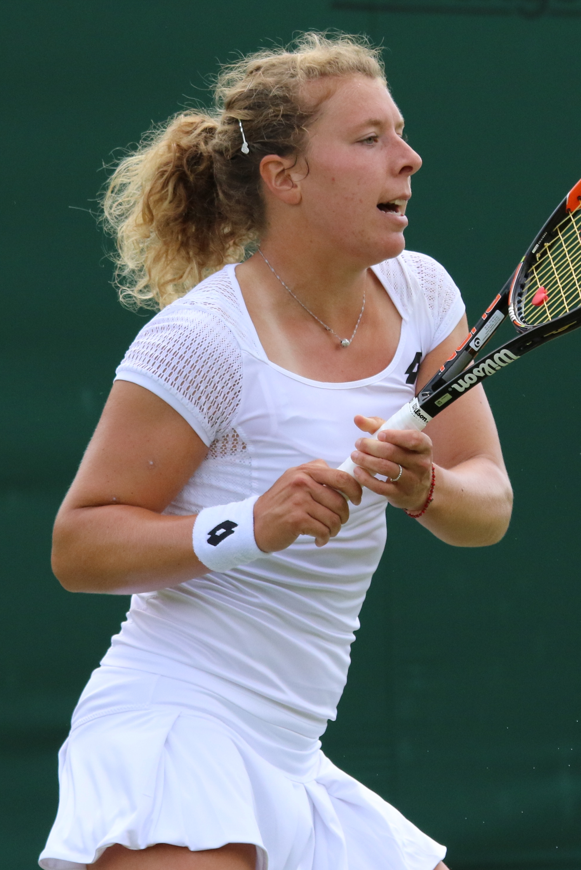 Friedsam WM16 (15)